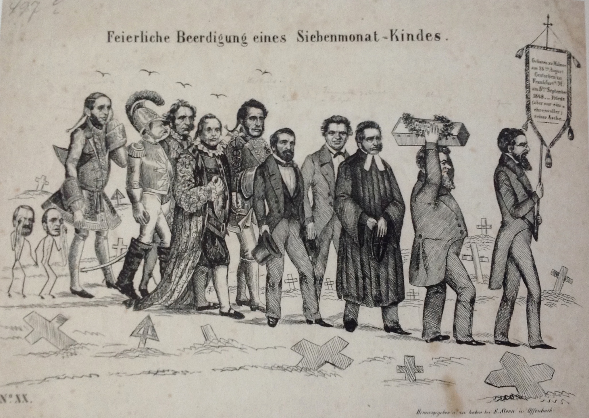 “Feierliche Beerdigung eines Siebenmonat-Kindes”. Karikatur auf den Waffenstillstand von Malmö. Robert Blum (2. von rechts), Friedrich Christoph Dahlmann (3. von rechts).